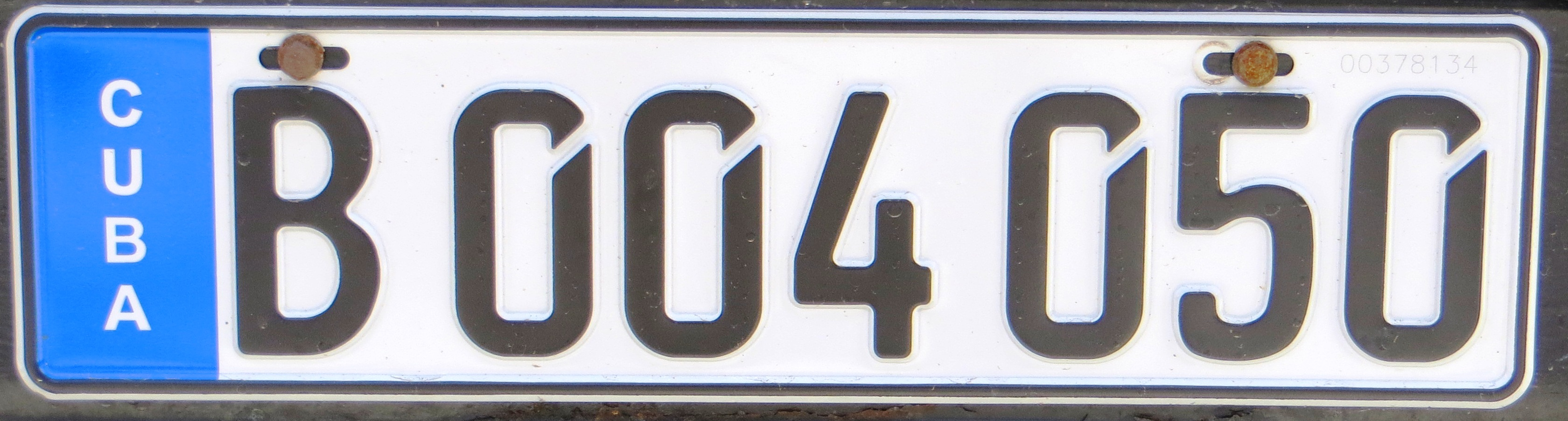 Kentekenplaat van Cuba